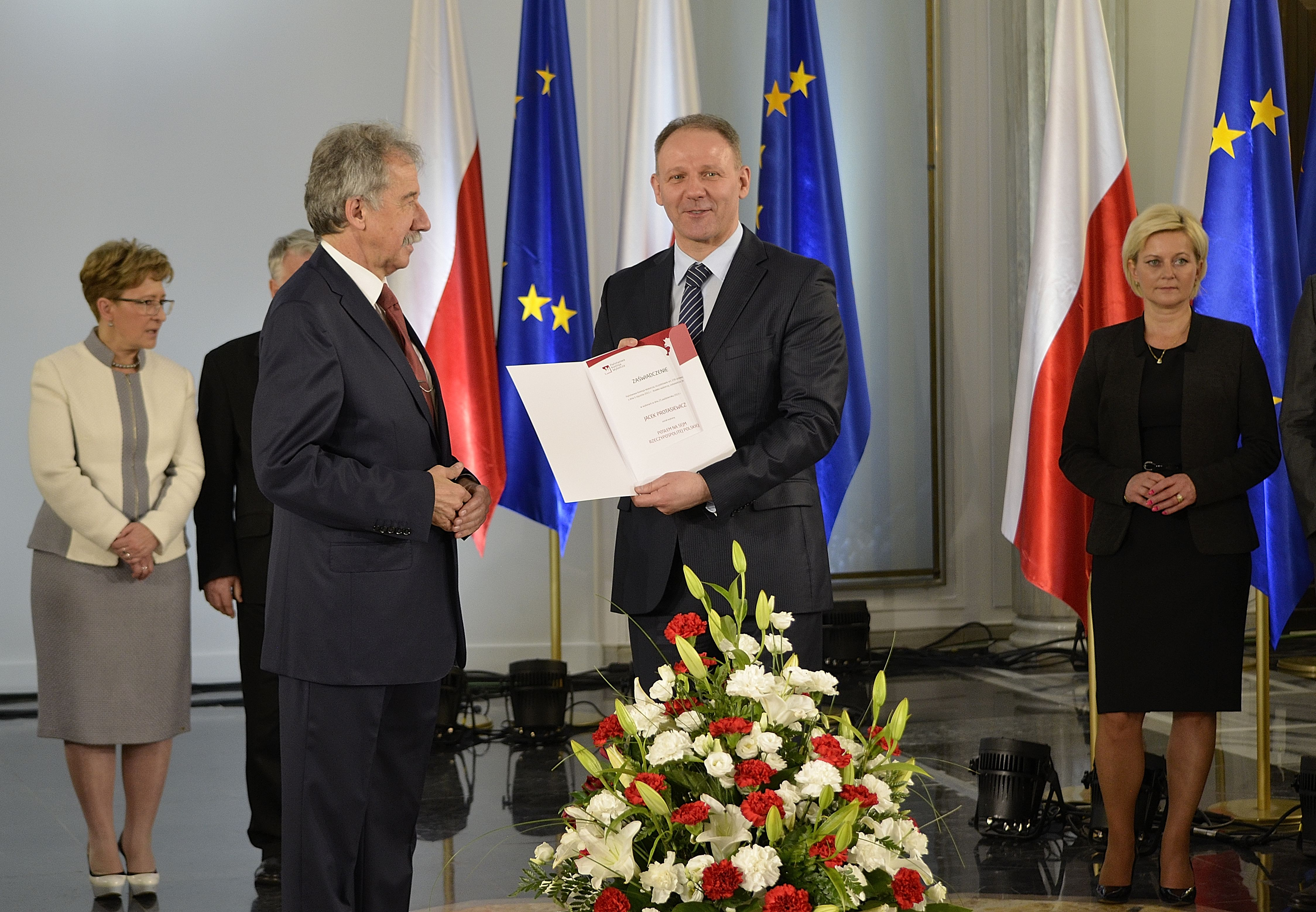 Poseł Jacek Protasiewicz podczas uroczystości wręczenia zaświadczeń o wyborze nowo wybranym posłom w Sali Kolumnowej Sejmu